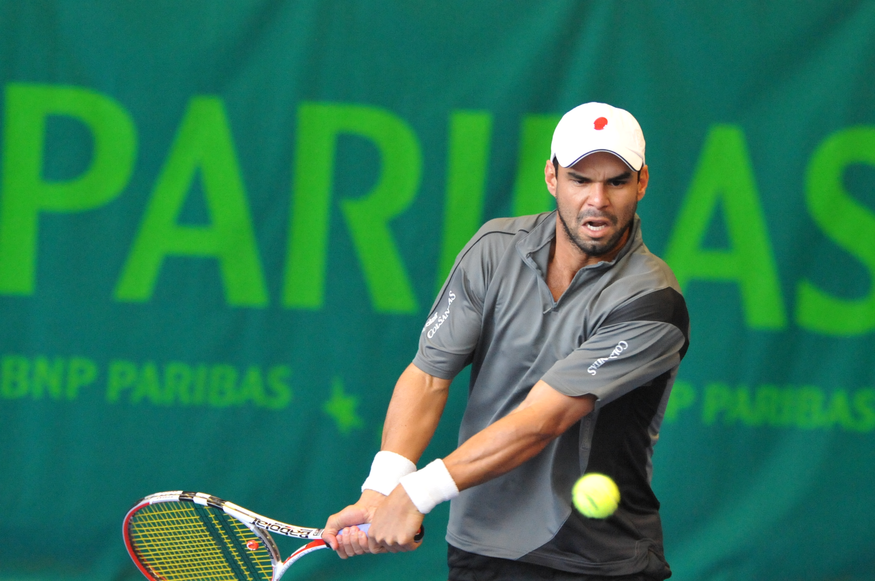 Vainqueur 2009